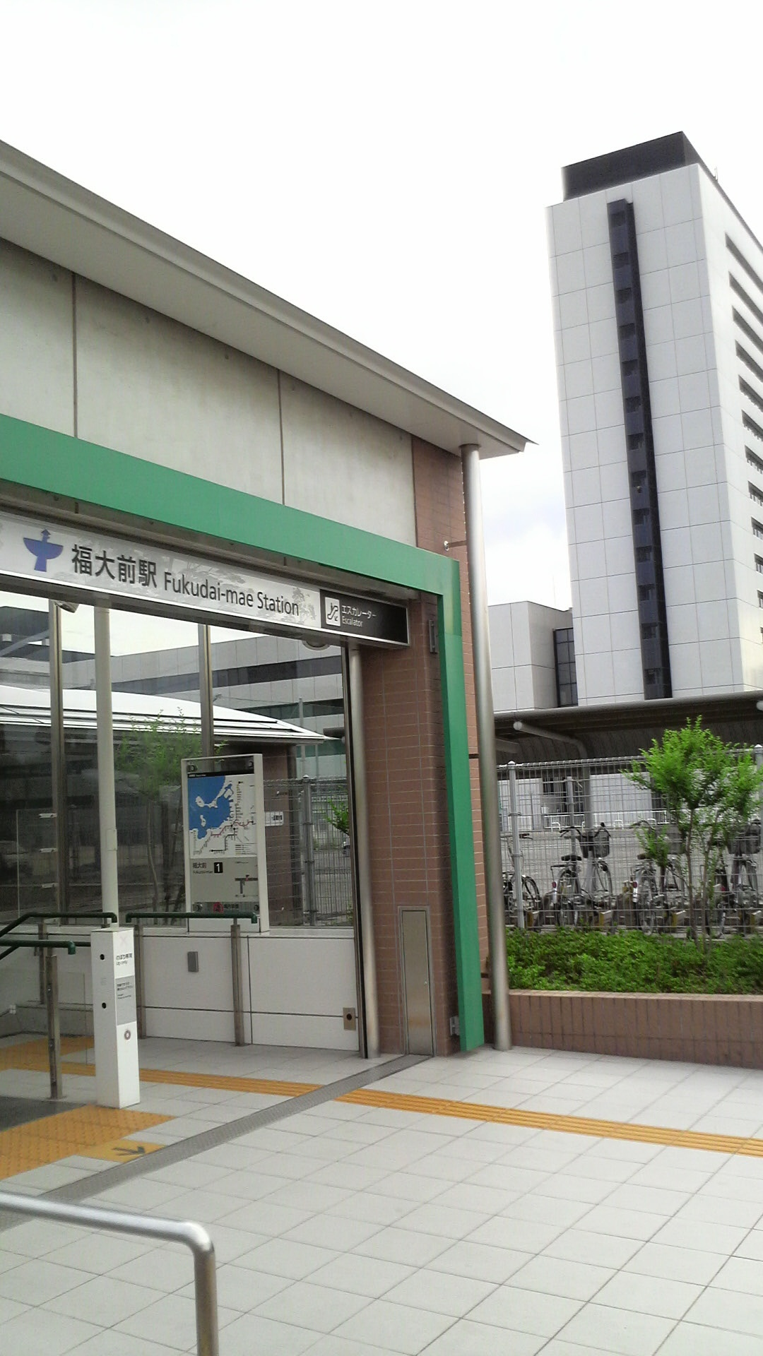 福岡市地下鉄七隈線福大前駅の1番出口と福岡大学の校舎